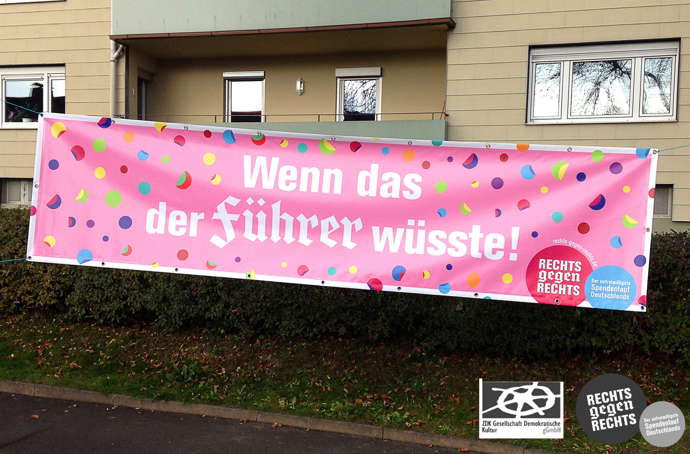 Am Straßenrand wurden Plakate errichtet mit Sprüchen wie "Wenn das der Führer wüsste" und "Flink wie Windhunde, zäh wie Leder - und großzügig wie nie!".